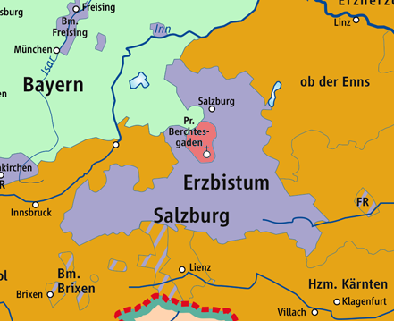 Karte des Fürsterzbistums Salzburg 1789 / Map Archbishopric of Salzburg 1789, Ausschnitt aus